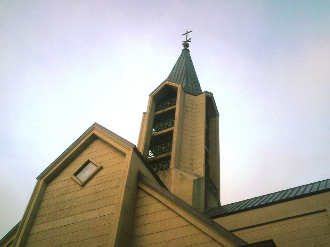 Torre de la catedral de Valdivia, Chile